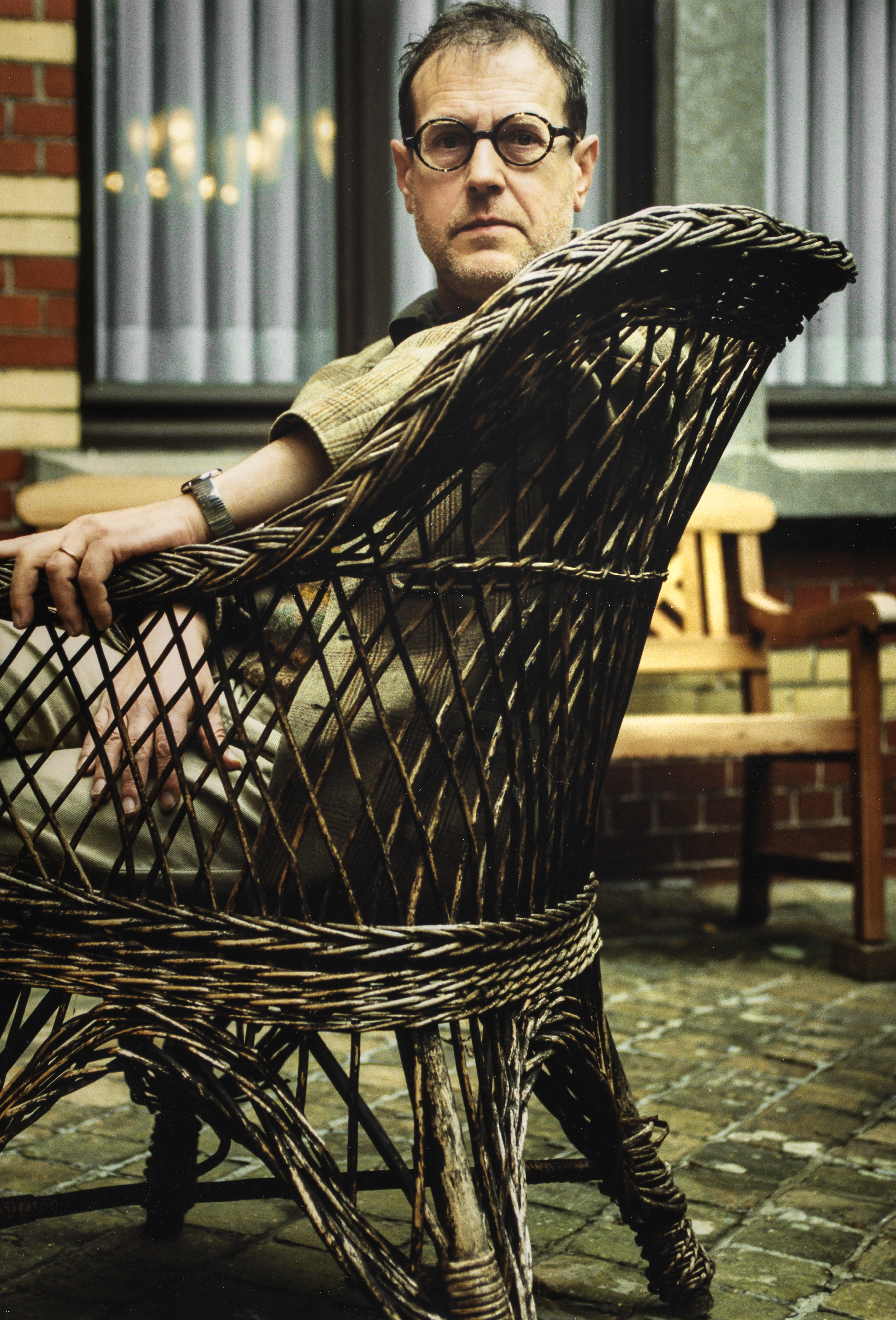 Pjeroo Roobjee, pseudoniem van Dirk De Vilder, Belgisch kunstschilder en schrijver.